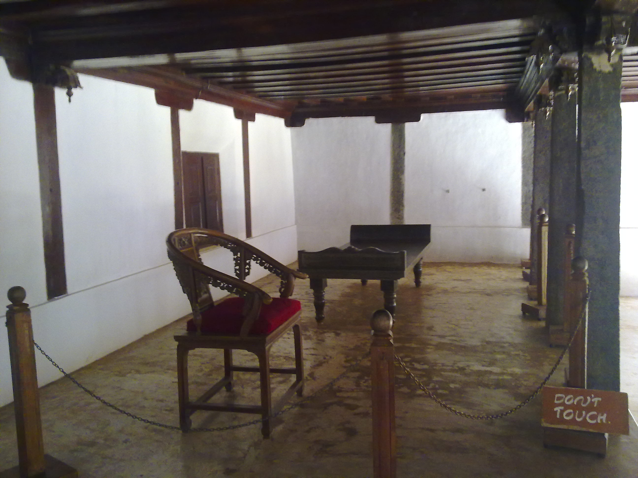 പത്മനാഭപുരം കൊട്ടാരംത്തിന്റെ പൂമുഖം